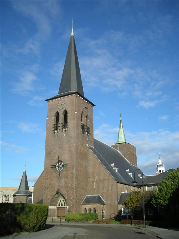 R.K. Heilige Geestkerk te Heerenveen